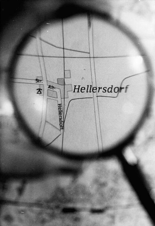 Berlin, Karte von Hellersdorf ADN-ZB Zimmermann 28.1.86 Berlin: Wohnungsbau Auf dem Stadtplan noch vor kurzem mit der Lupe zu suchen: der Hort Hellersdorf im Osten der Hauptstadt mit 563 Einwohnern im Jahre 1984. 3071 Wohnungen werden allein 1986 im Wohngebiet 2 gebaut. Mehr als 1600 Bauleute aus mehreren Bezirken errichten in der FDJ-Initiative Berlin außerdem drei Schulen, je eine Turn- und Kaufhalle, vier kombinierte Kindereinrichtungen sowie drei Gaststätten. -siehe auch 1986-0128-1,2 und 4 N - [Berlin.- Mit einer Lupe vergrößerte Karte von Hellersdorf]